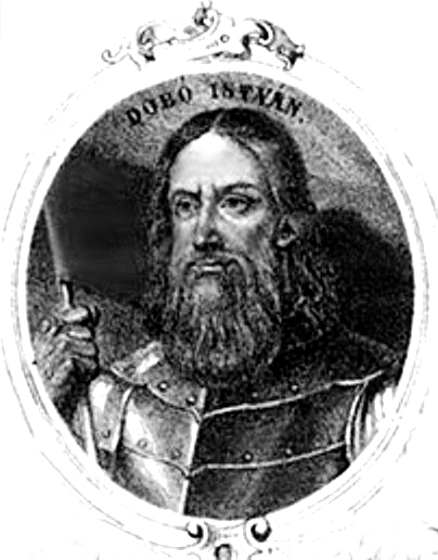 Dobó István arcképe